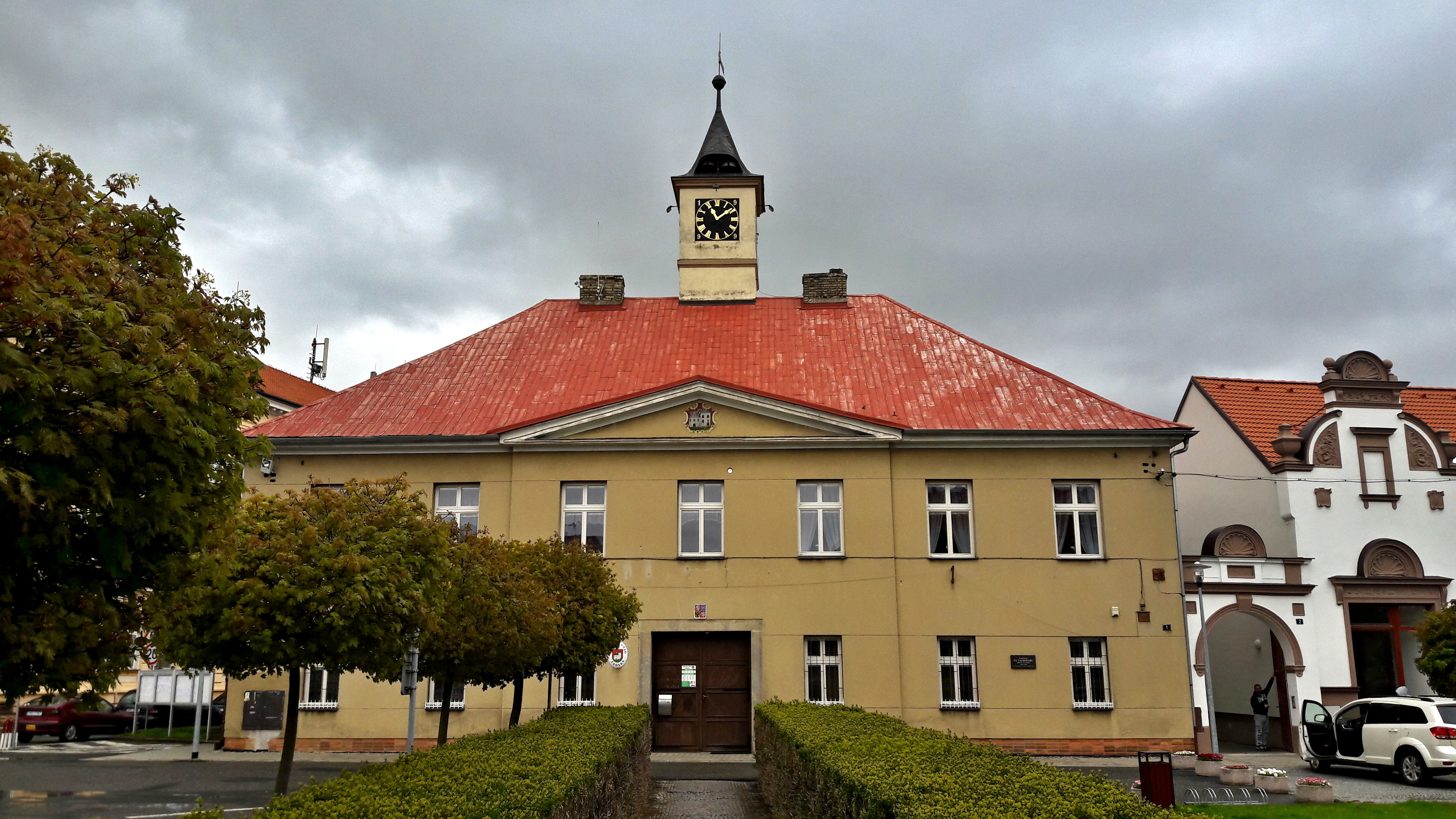 Sadská